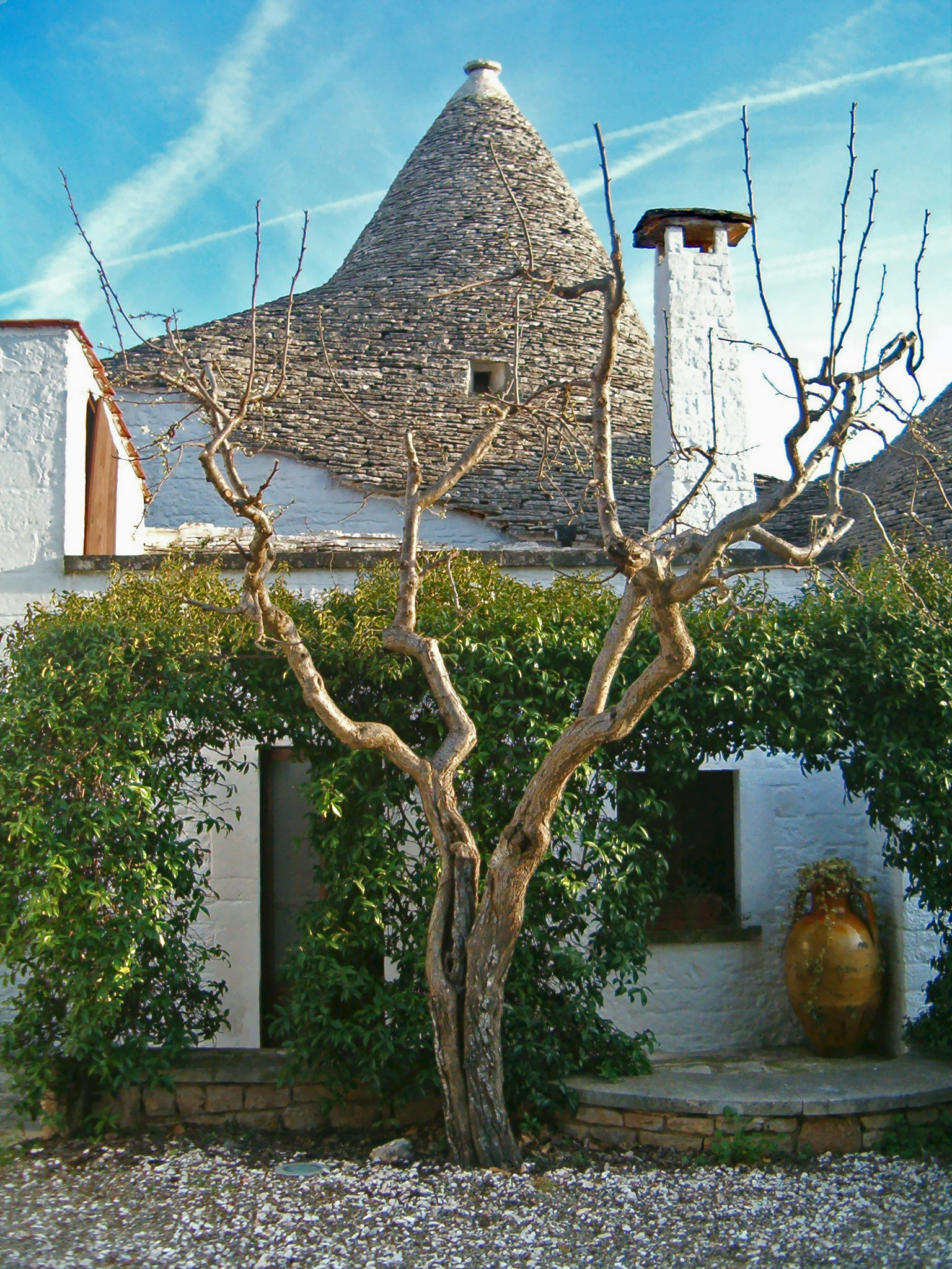 Trulli di Alberobello, Italy Trullo Sovrano, retro